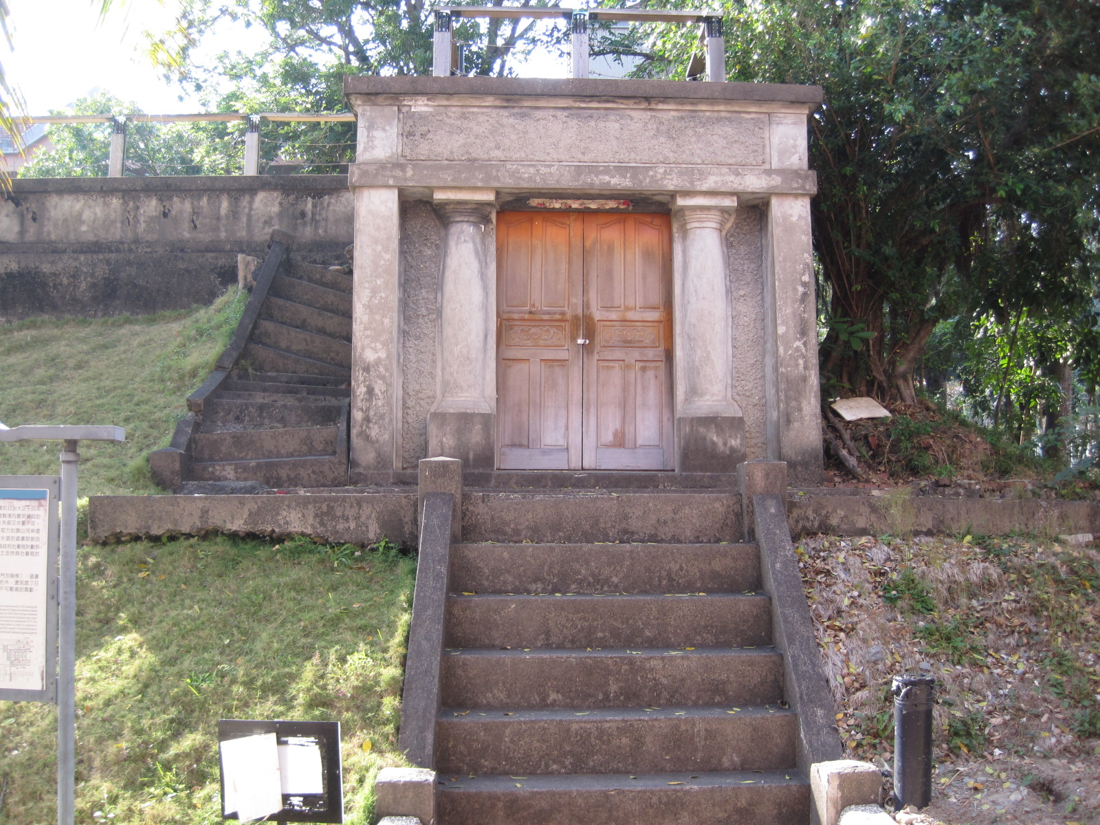 原旗山上水道